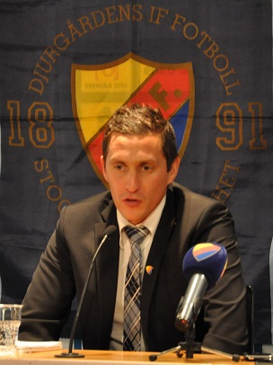 Carlos Banda